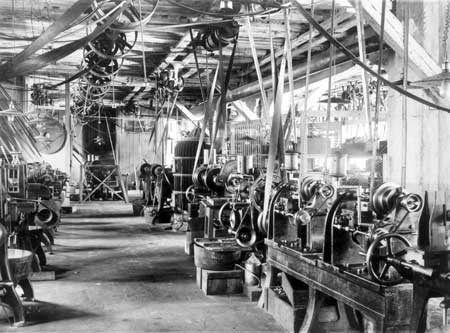 Inside Kongsberg Våpenfabrikk (Kongsberg Arms Factory) around 1900.